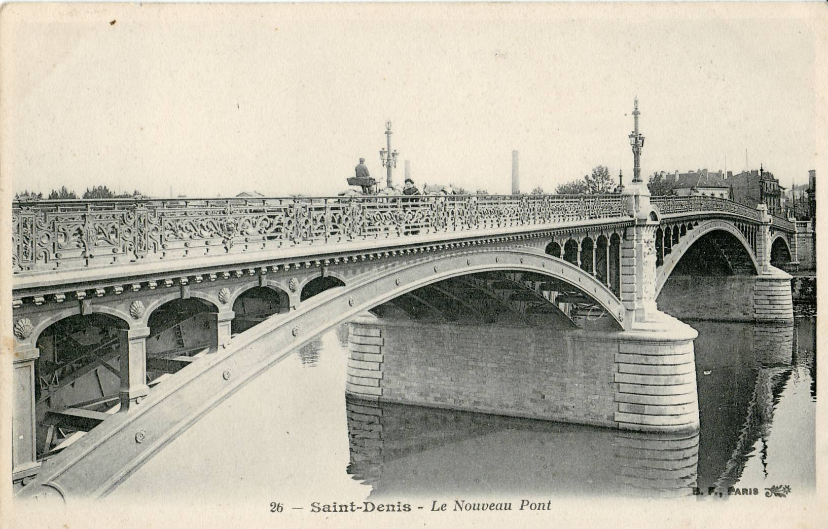 Carte postale ancienne éditée par BF à Paris, n°26 : SAINT-DENIS - Le Nouveau pont